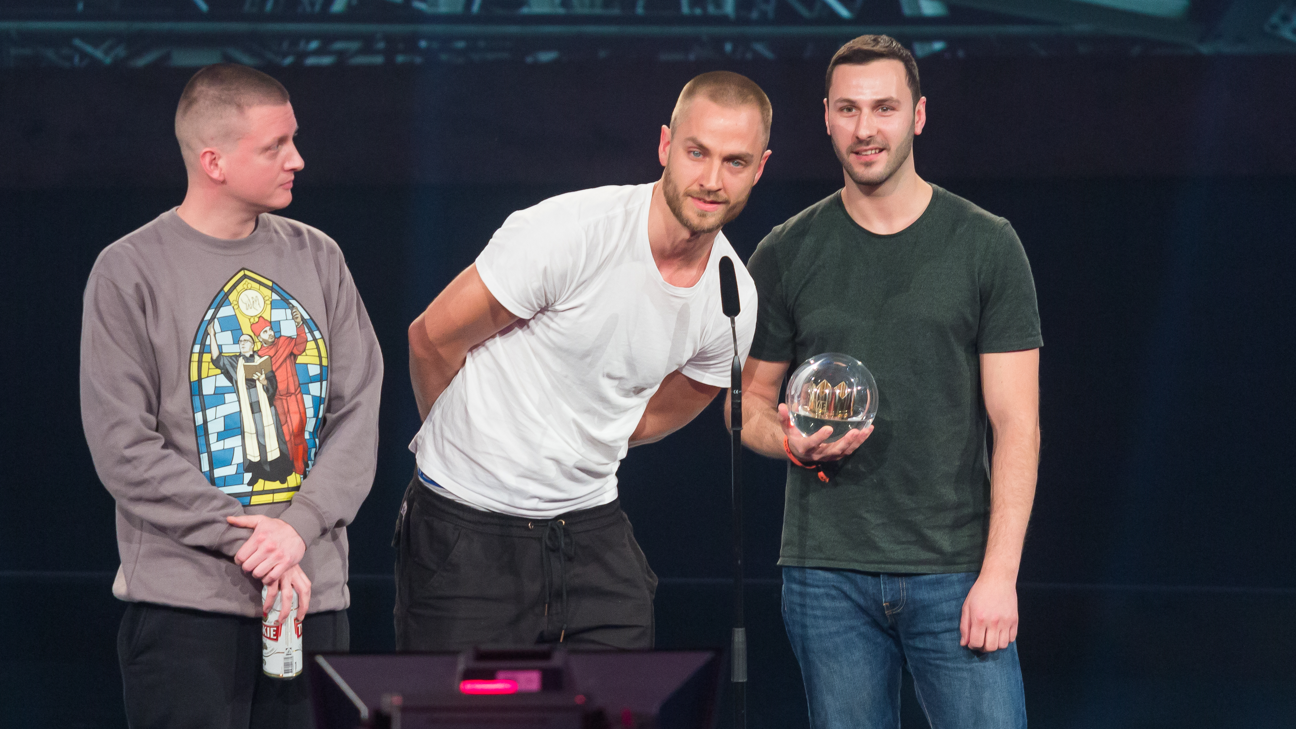 1LIVE Krone 2016 - Show - K.I.Z. als bester Live-Act